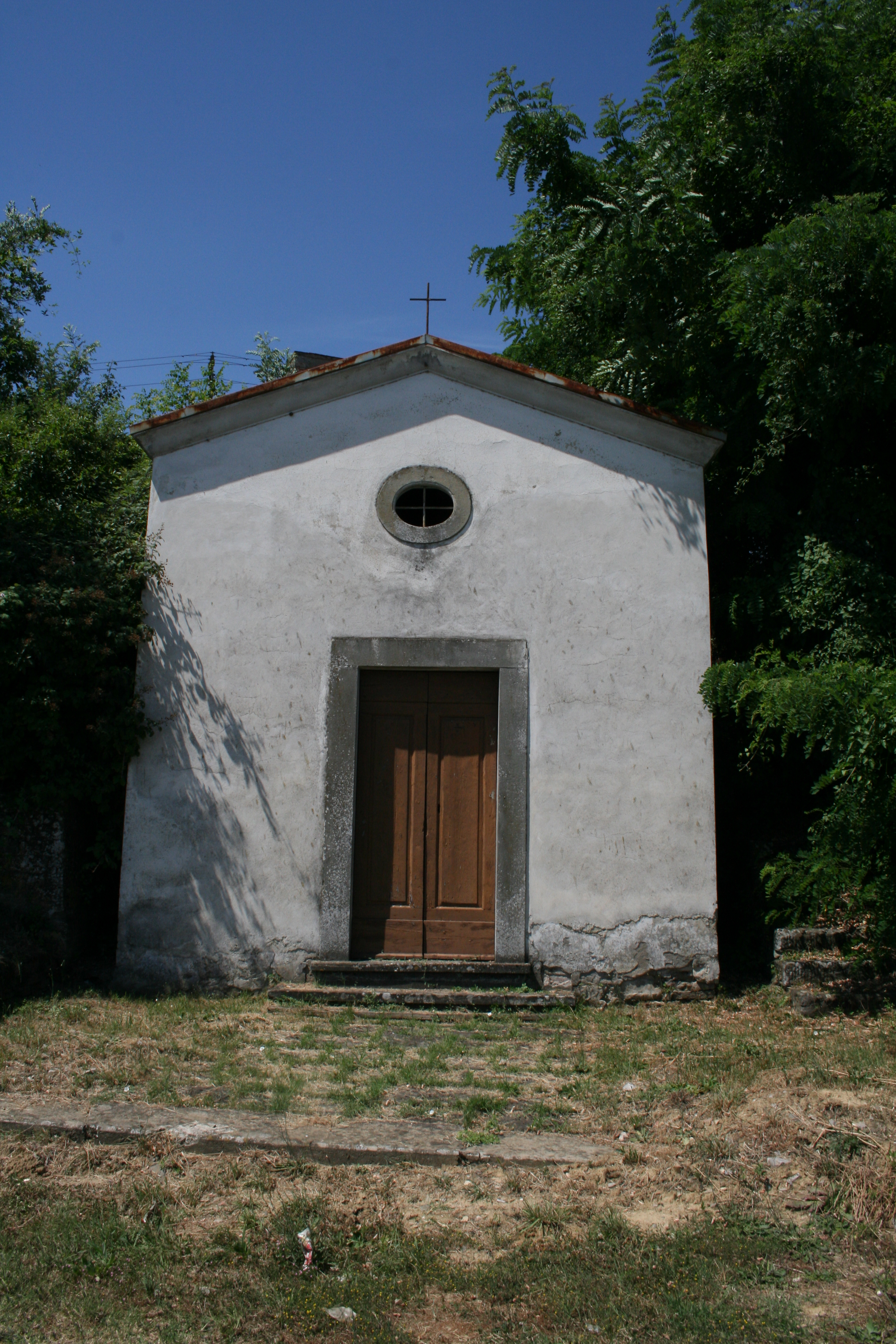 Santa Umiliana de' Cerchi chapel